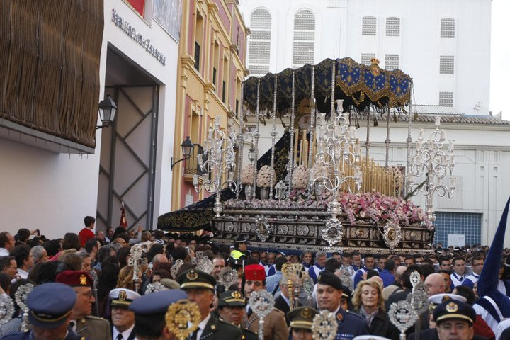 foto de la virgen de la estrella